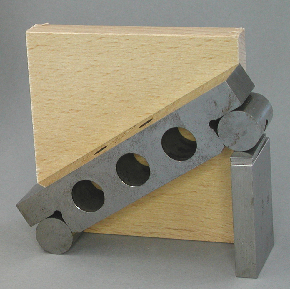 Sinuslineal